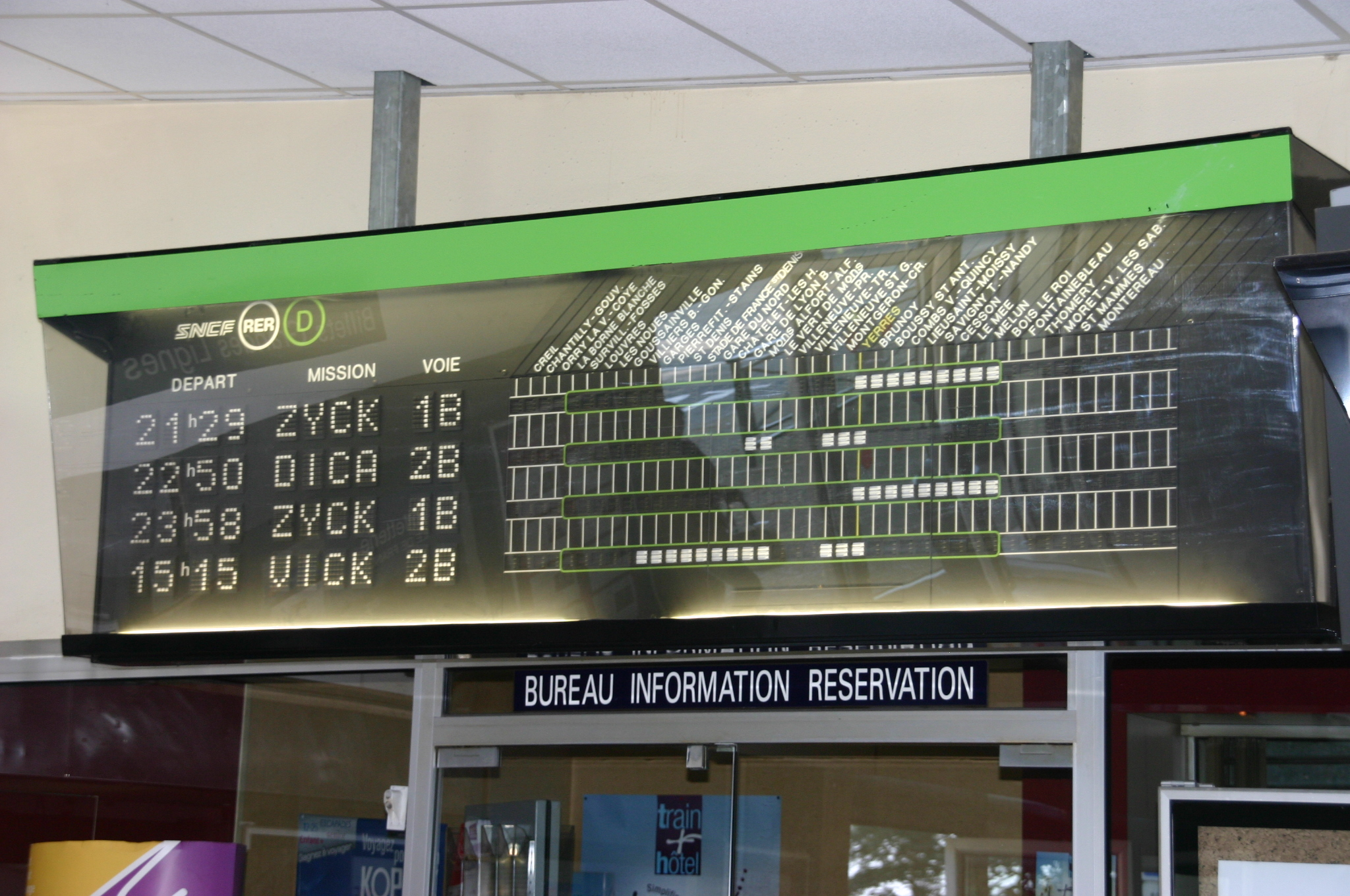 La Gare de Yerres, Yerres, département de l'Essonne, France